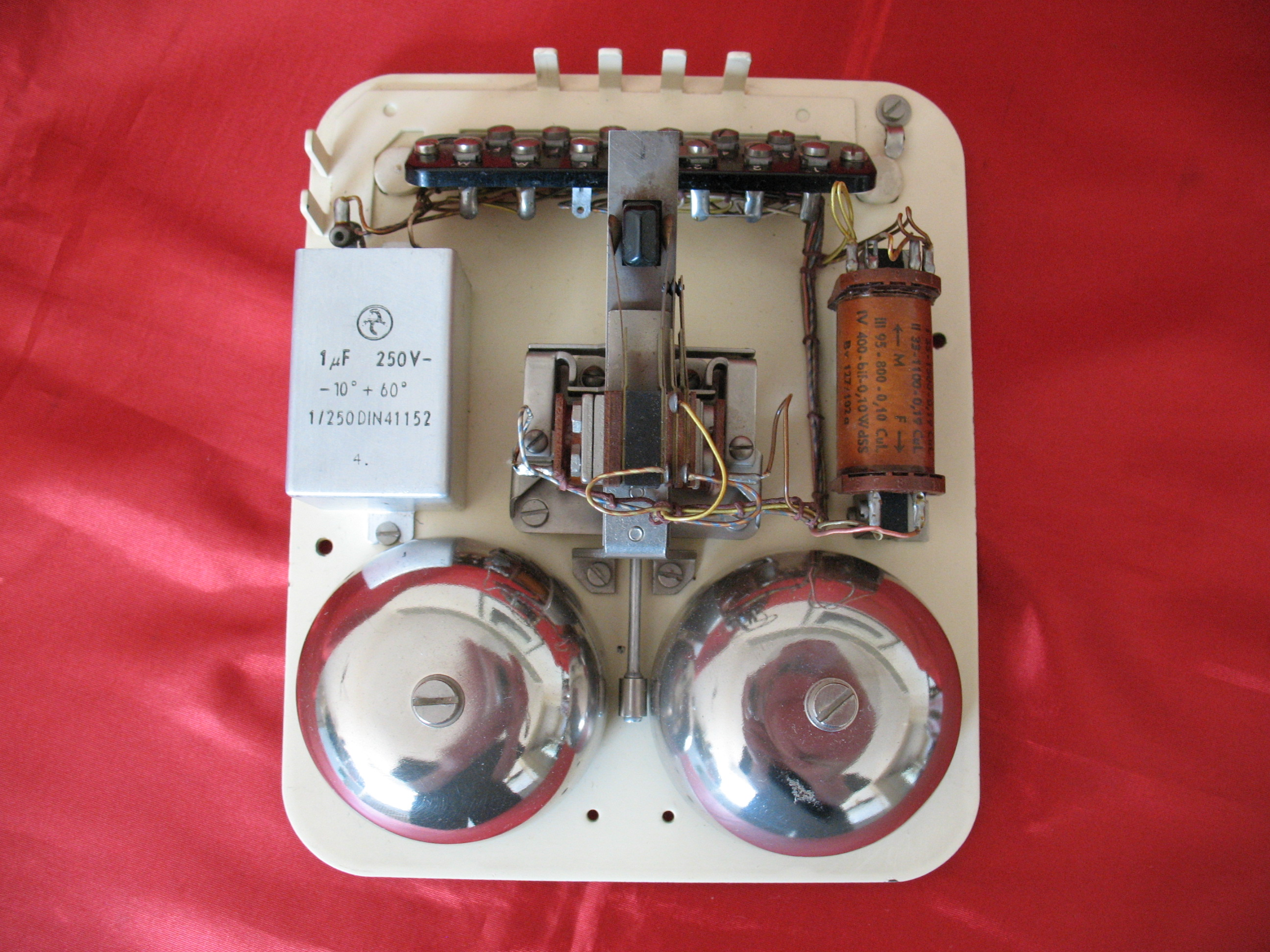 Bestückte Grundplatte eines W 48 von 1957 Hersteller Krone